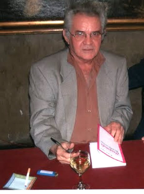 Foto do escritor